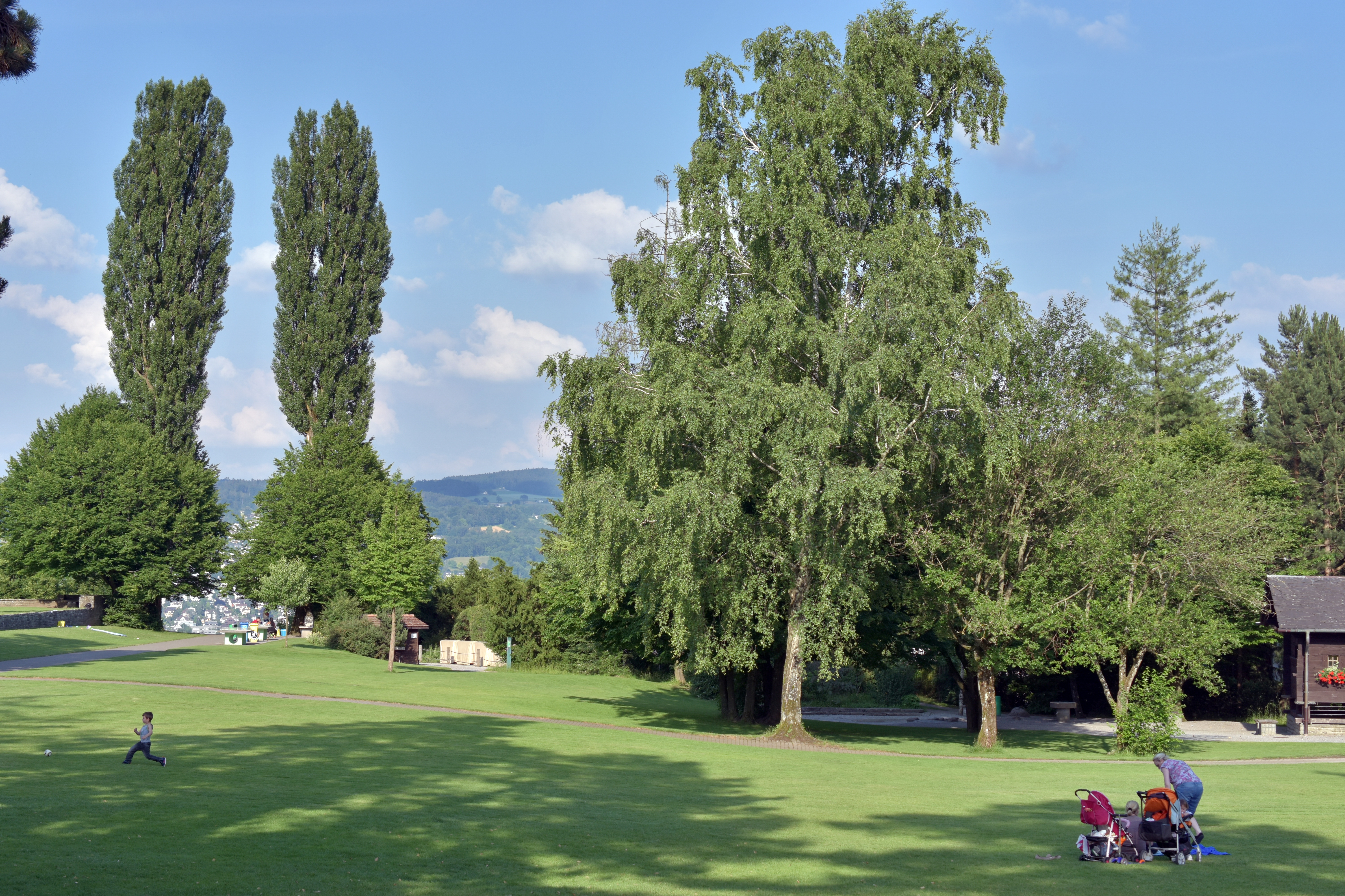 Adele & Gottlieb Duttweiler's' Park im Grüene in Rüschlikon (Switzerland)